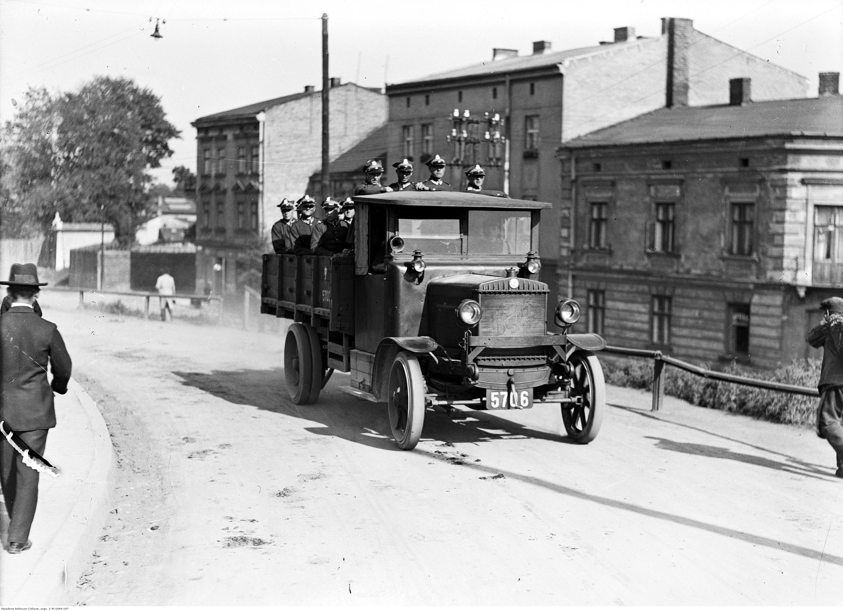 Ciężarówka Berliet CBA będąca na wyposażeniu Wojska Polskiego.